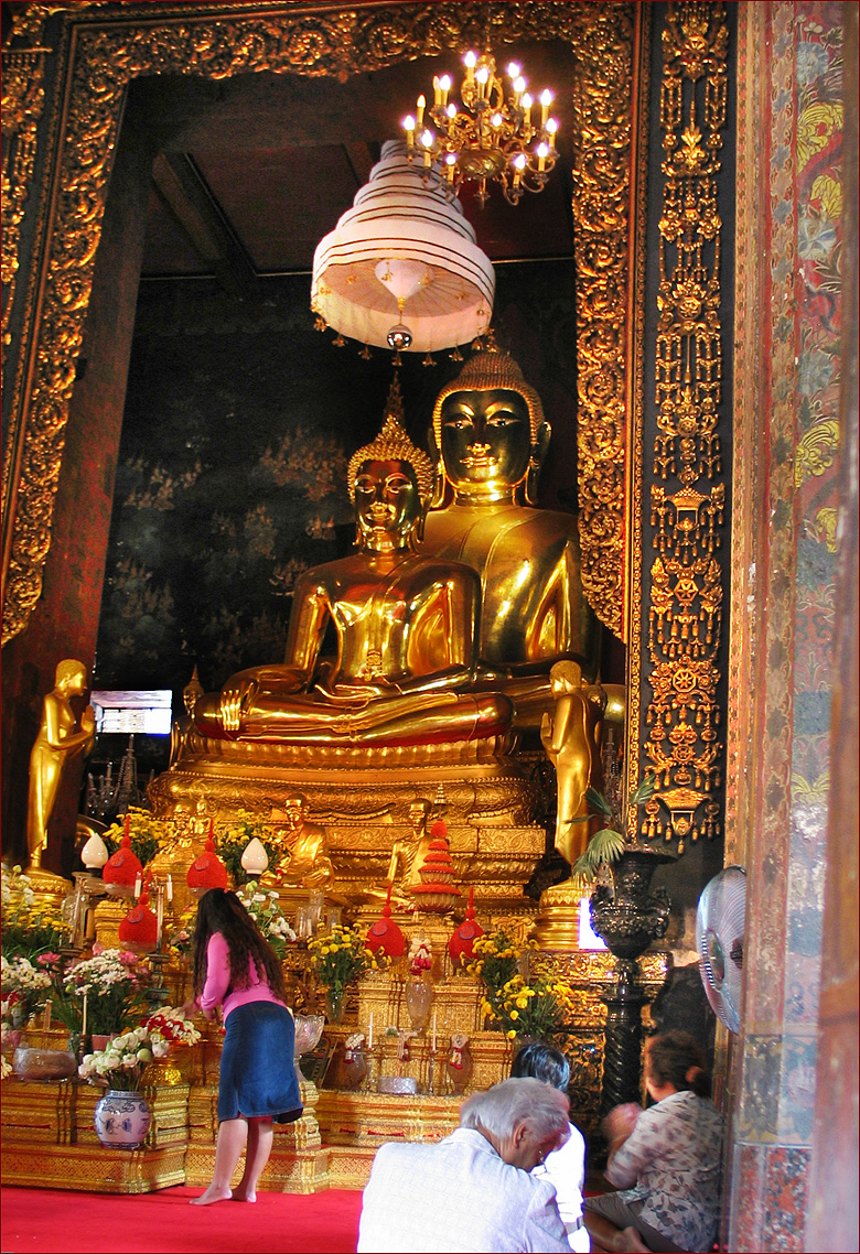 Phra Puttha Chinasi, Wat Bowonniwet (วัดบวรนิเวศวิหาร), Phra Nakhon, Bangkok.